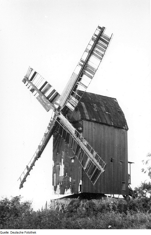 Original image description from the Deutsche Fotothek Drackenstedt. Mühle Michaelis, Bockmühle (1984/85 nach Hohenwarthe, Landkreis Jerichower Land, umgesetzt)